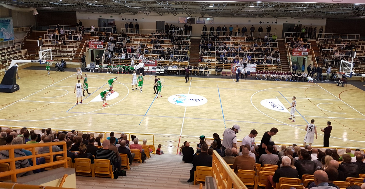 Stargard, 06.05.2017r. Trzeci mecz Spójnia - Legia